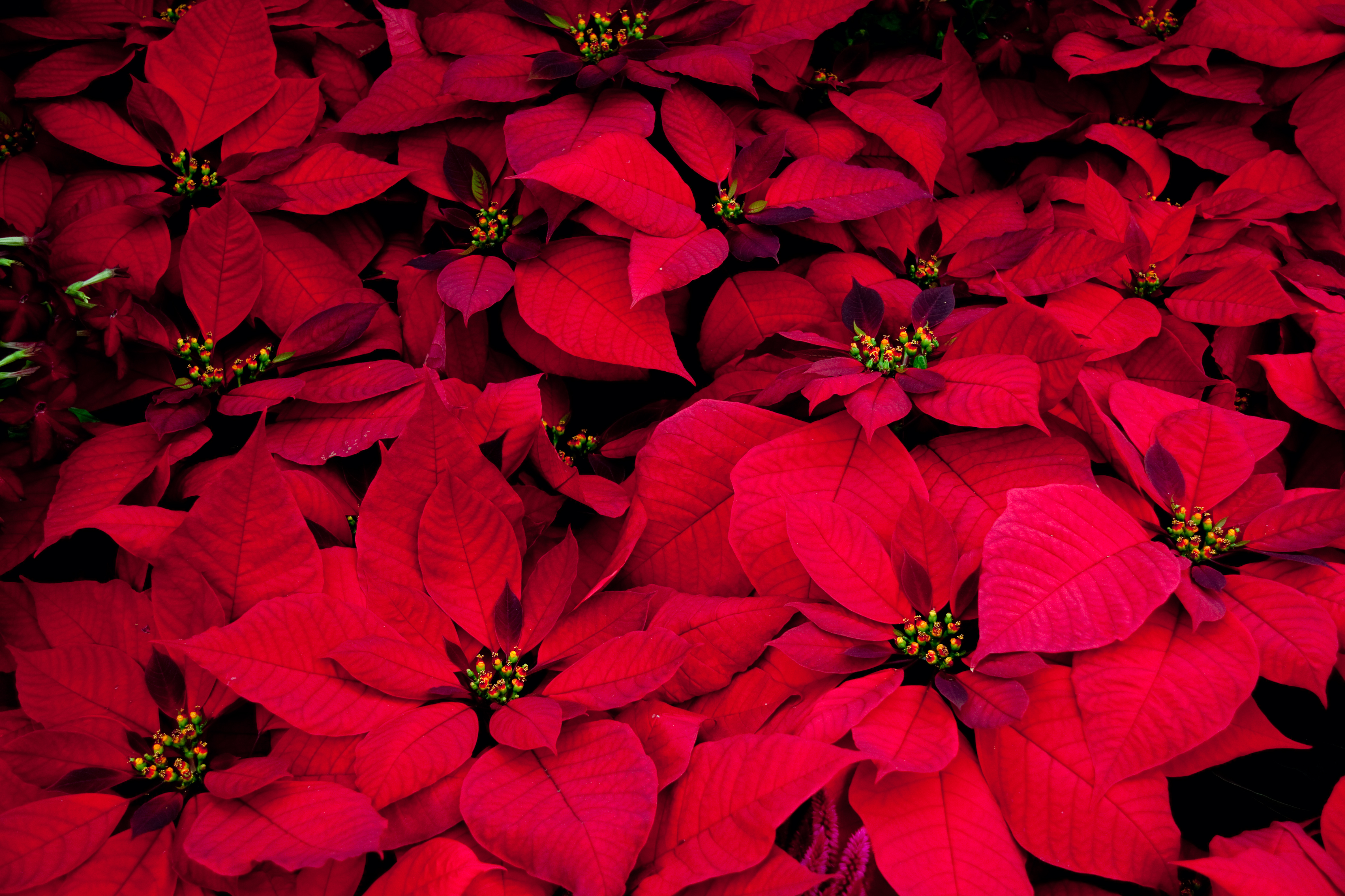 Poinsettia